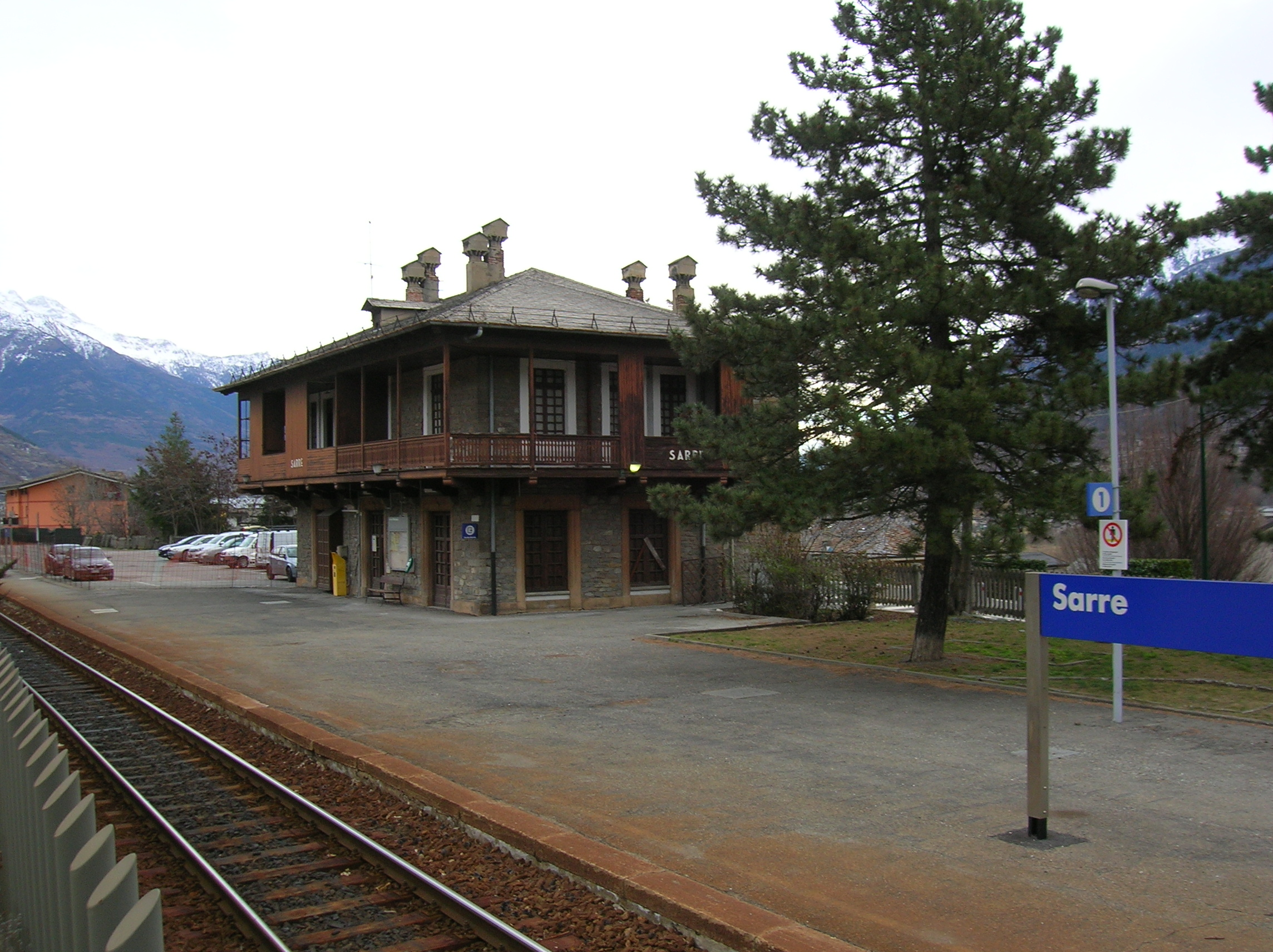 Stazione ferroviaria di Sarre, Valle d'Aosta, Italia.